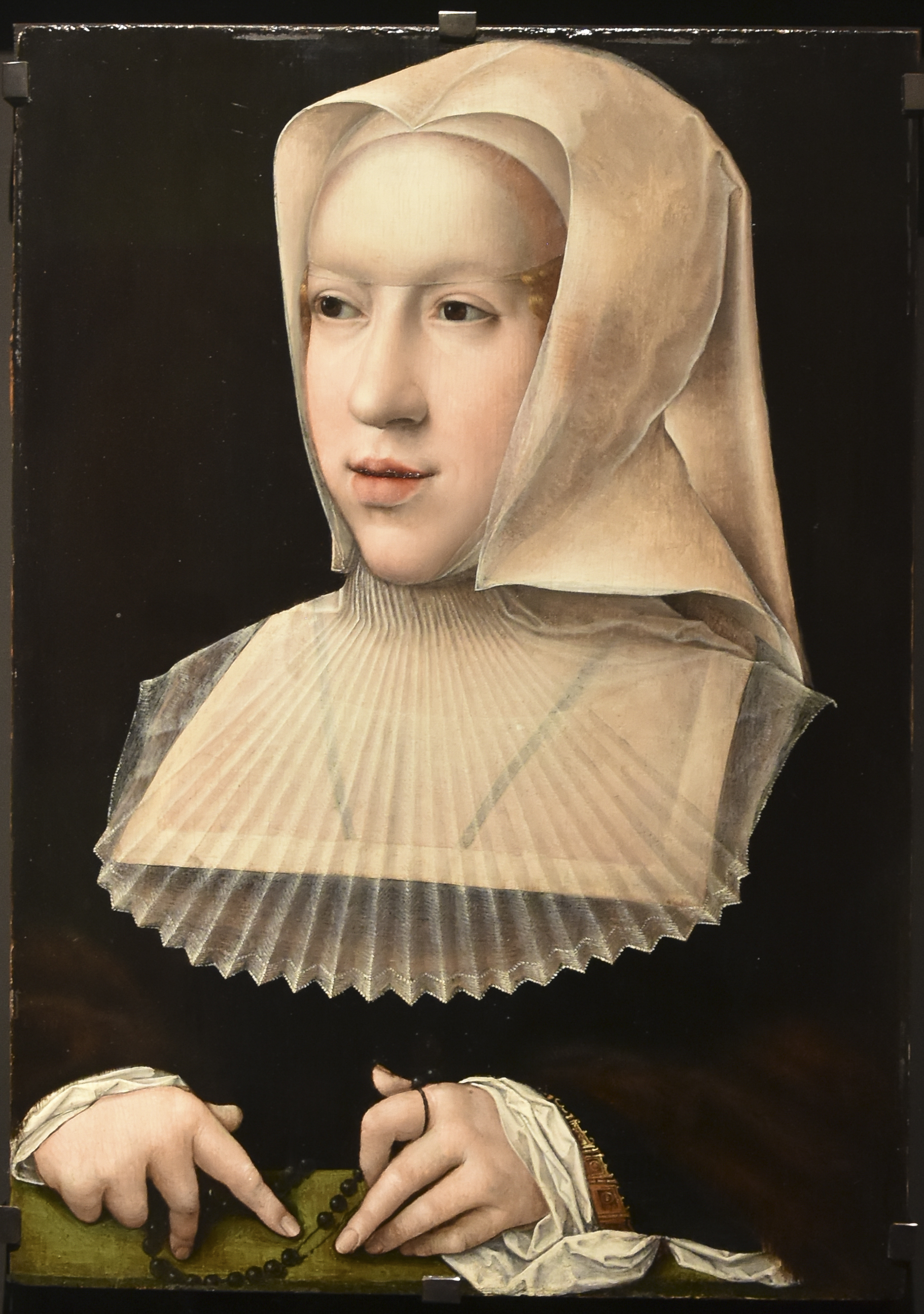 Bernard van Orley (1488-1551) - Margaretha van Oostenrijk (1480-1530) na 1518 - Koninklijk klooster van Brou, besteld door Margaretha aan van Orley in 1518